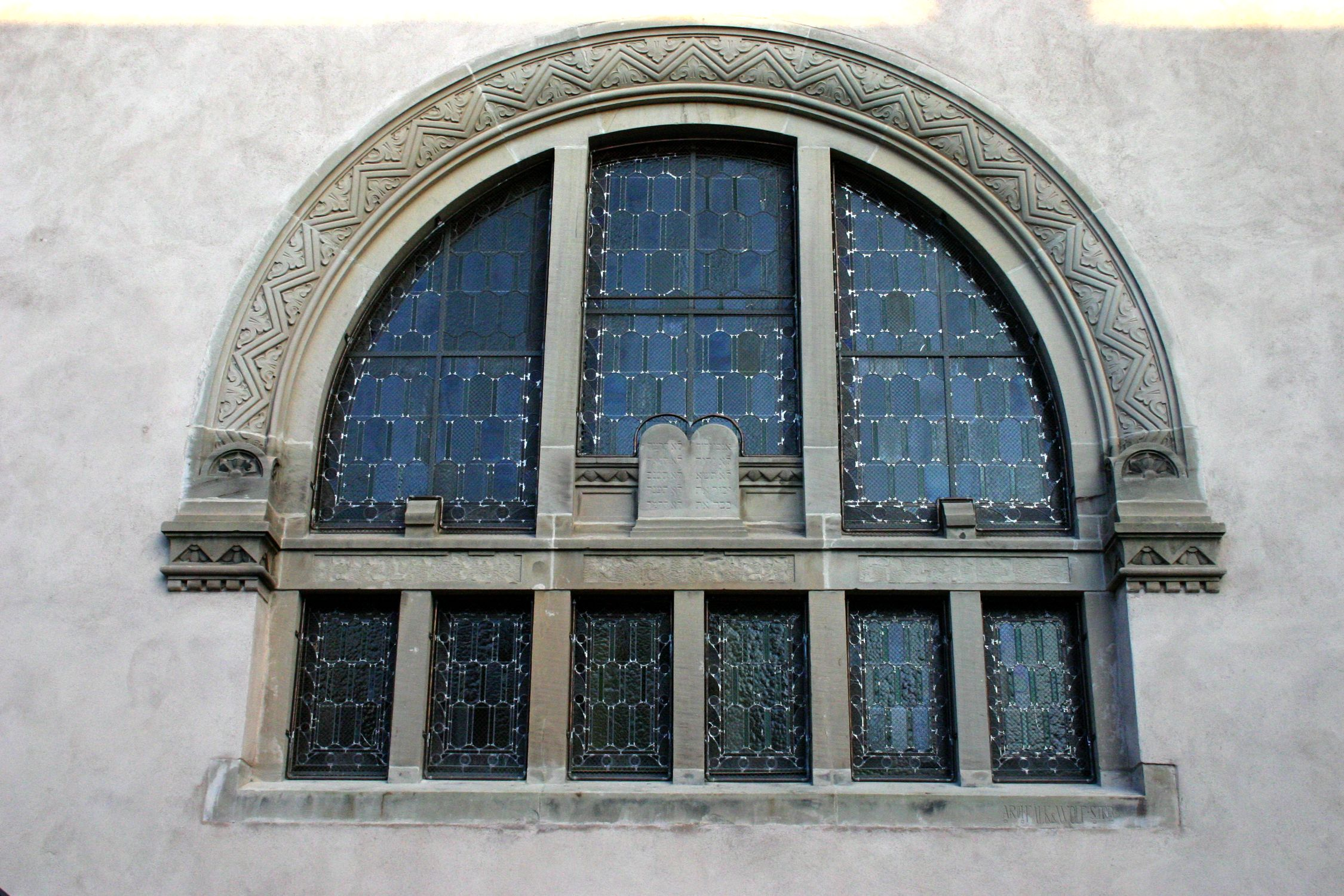 Synagogue de Schirmeck : Façade (détail)